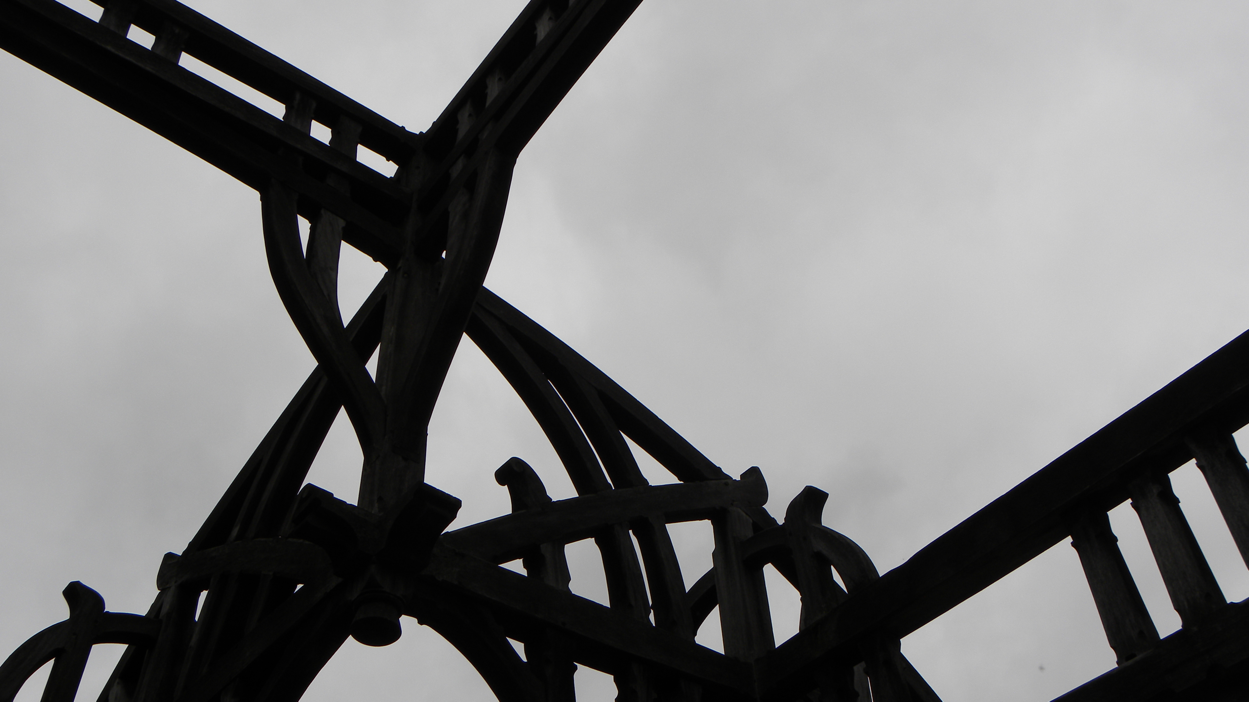 Structure en bois ayant servi dans le palais des Colonies lors de l'expo coloniale de 1897. Oeuvre de Georges HOBE. En 2011 elle figure derrière ce palais. Vue d'un détail.